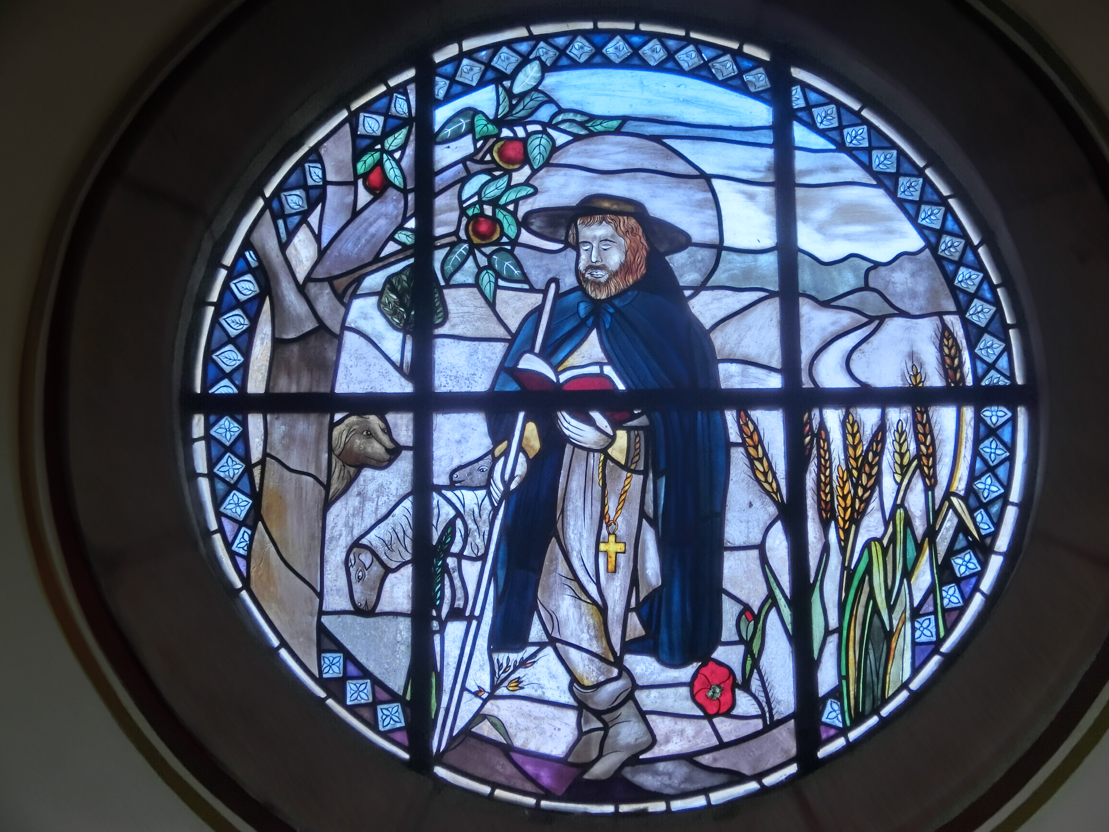 Deutschland (D) - Baden-Württemberg (BW) - Landkreis Konstanz (KN) - Mühlingen, Ortsteil Hecheln: St. Wendelin-Kapelle; Fenster mit Darstellung des Hl. Wendelin